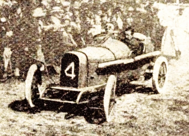 Kenelm Lee Guinness, vainqueur du RAC Tourist Trophy 1914 sur Sunbeam - La Vie au Grand Air, 27 juin 1914, p.585